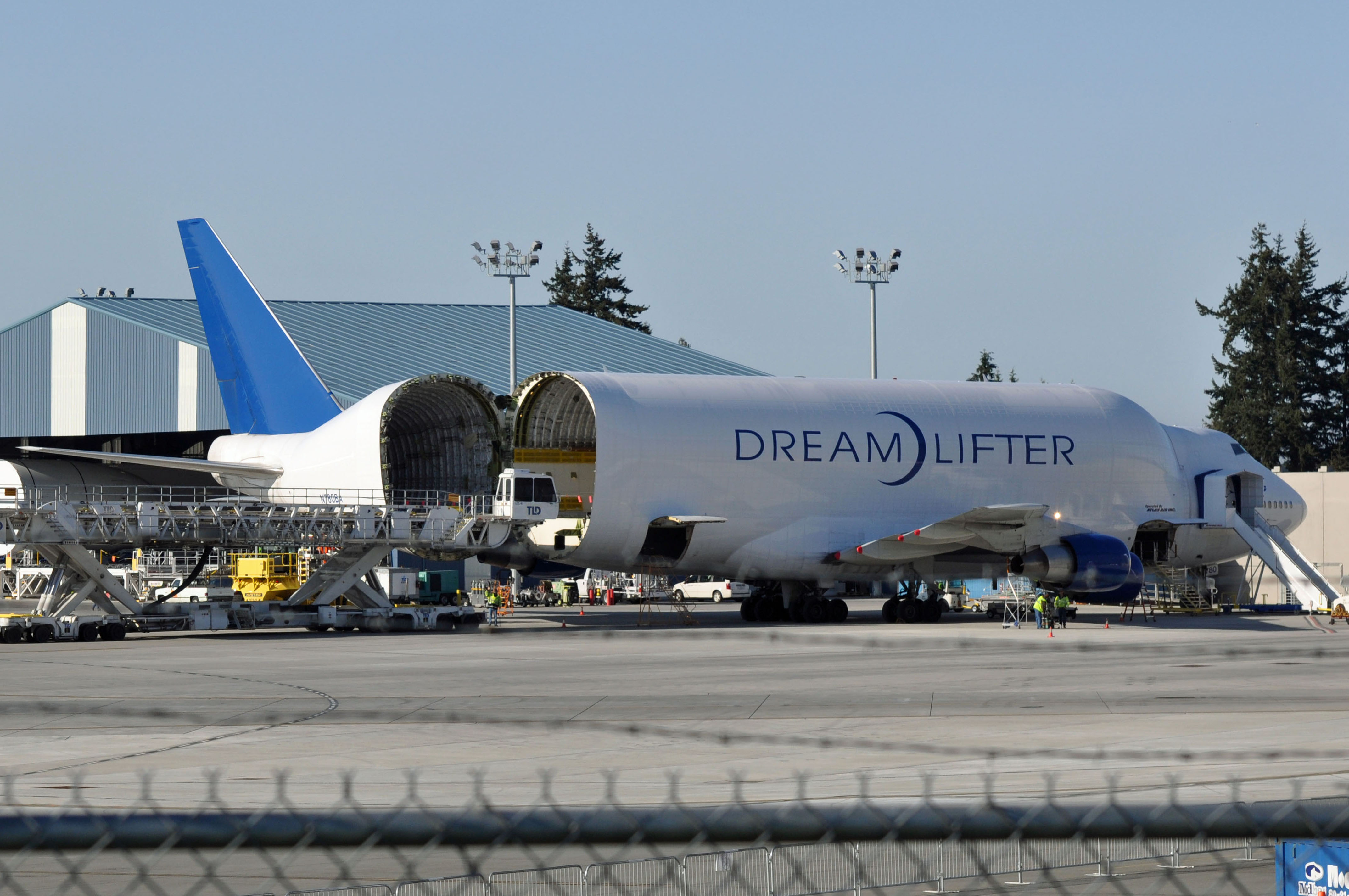 MSN 24310 LN 778 B747-409LCF / 747 / 747-400 / 747-400F BOEING / ATLAS AIR PAE BOEING AIRPORT EX CHINA AIRLINES AS B-162 AND B-18272 / STORED 12/2004 TO 02/2007